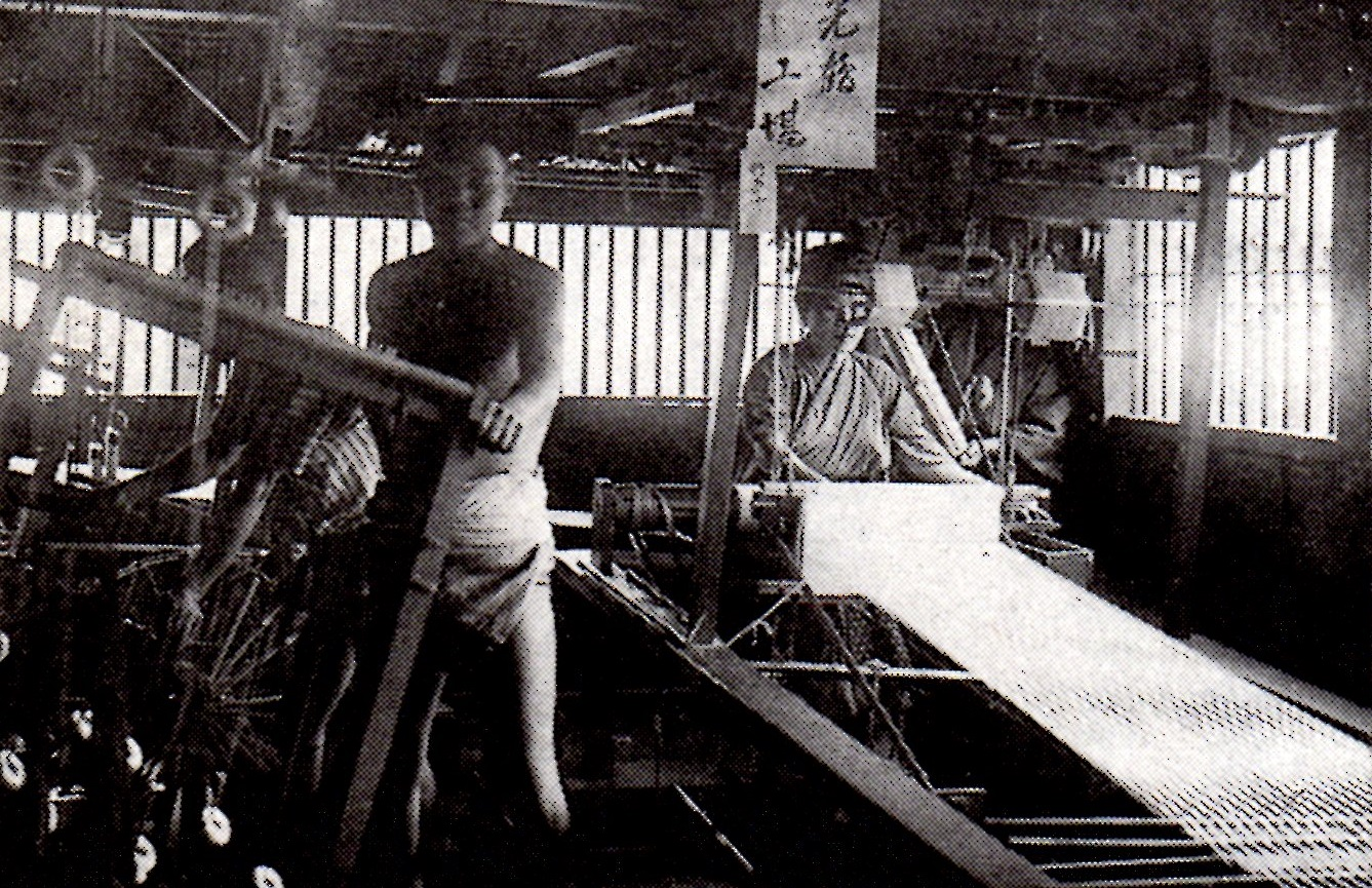 1907年（明治40年）に撮影された機屋の様子。車廻しと織手。